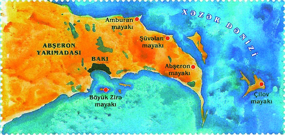 Lighthouses of Absheron archipelago